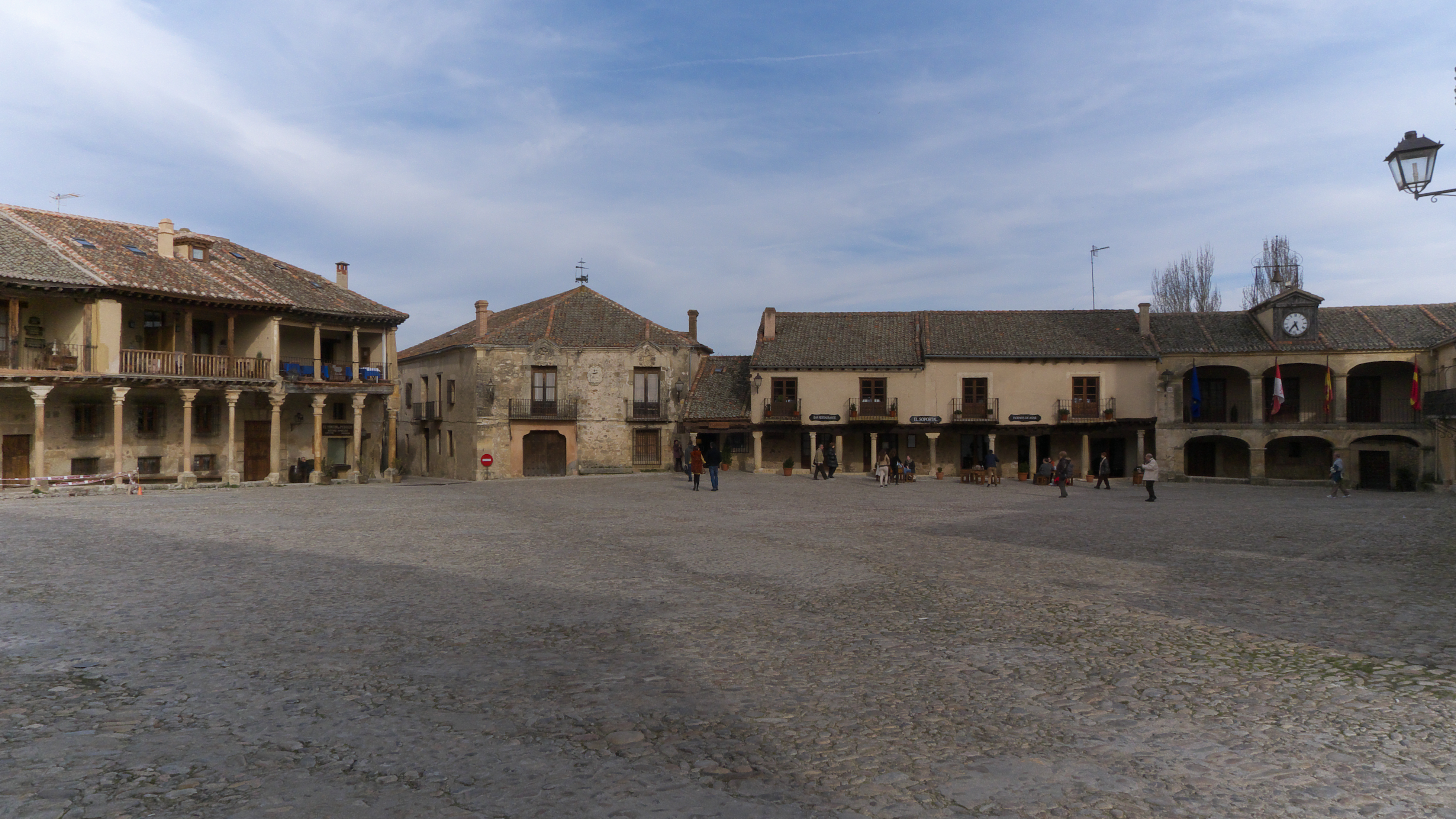 Plaza Mayor del bello pueblo de Pedraza